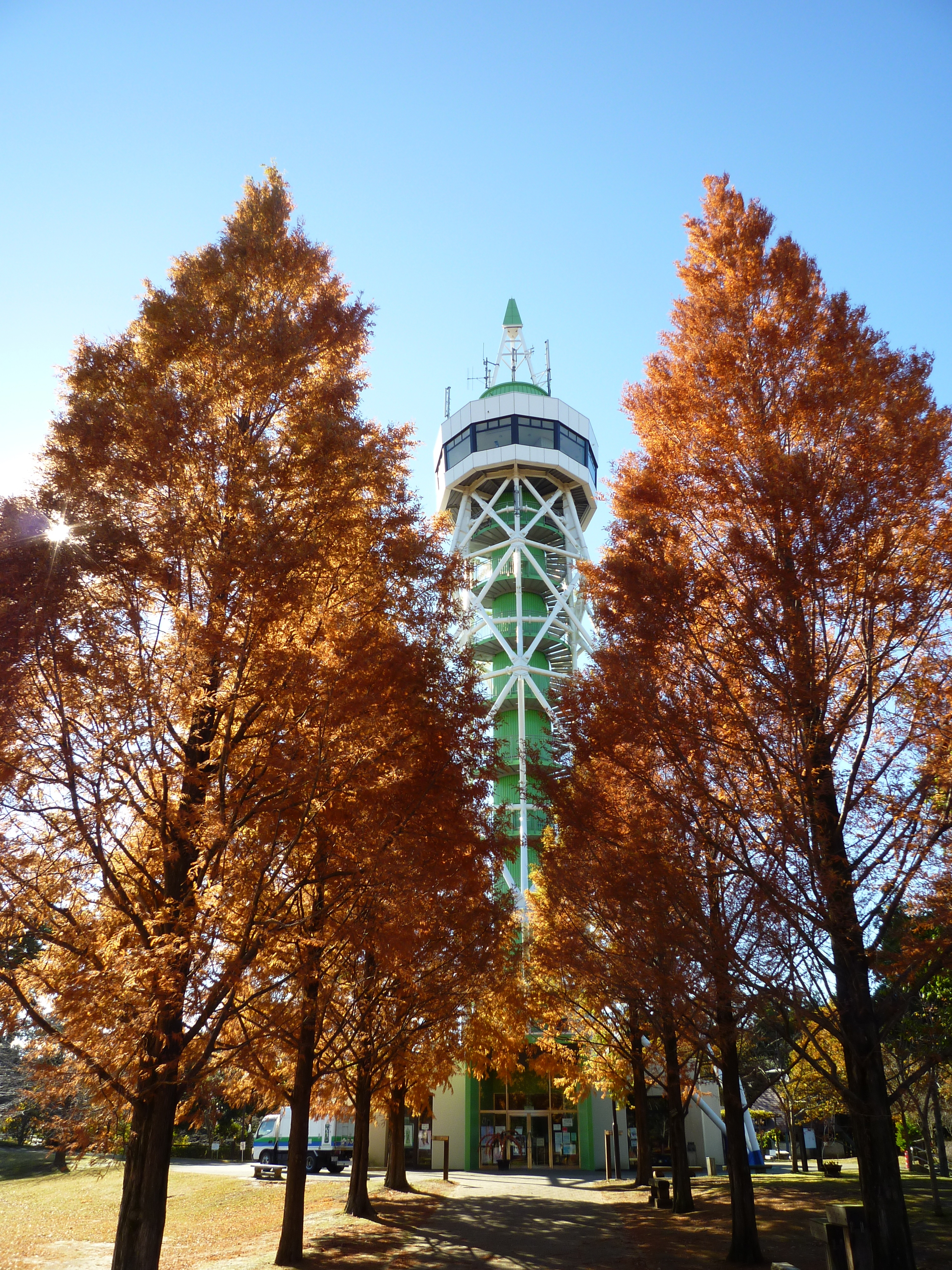 さんぶの森公園の展望台